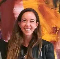 Cero emisiones CO2 y cero residuos radioactivos, así es el nuevo contrato de suministro de energía eléctrica para todos los edificios municipales y equipamientos del Ayuntamiento de Madrid y sus organismos autónomos. Dividido en cuatro lotes por un importe total de 82 millones de euros, el acuerdo va a marcar un hito en la metrópoli y supone un cambio trascendental en las políticas económicas y medioambientales del Consistorio. Por primera vez, las empresas que van a suministrar la electricidad solo comercializan energía de origen 100% renovable, lo que garantiza que las emisiones CO2 y que la generación de residuos radioactivos son nulas. De esta forma –ha constatado el delegado de Economía y Hacienda, Jorge García Castaño–, “cuidamos el medio ambiente y generamos un entorno empresarial y social que favorece los objetivos del Plan A del Aire y Cambio Climático de la Ciudad de Madrid en el marco con los compromisos internacionales como la Agenda 2030 de Desarrollo Sostenible y el Acuerdo de París de lucha contra el cambio climático”.